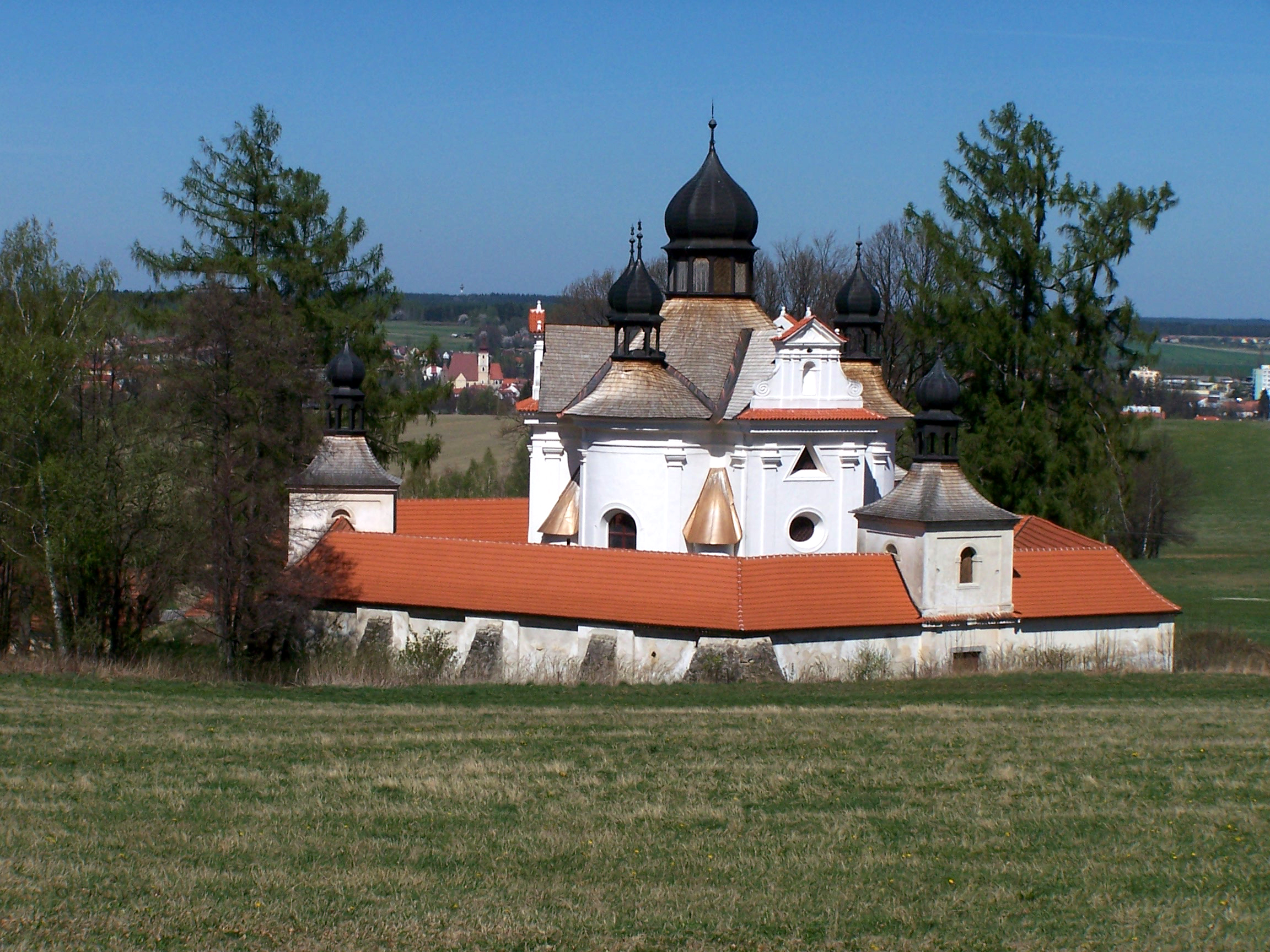 Kostel Nejsvětější Trojice nad Trhovými Sviny